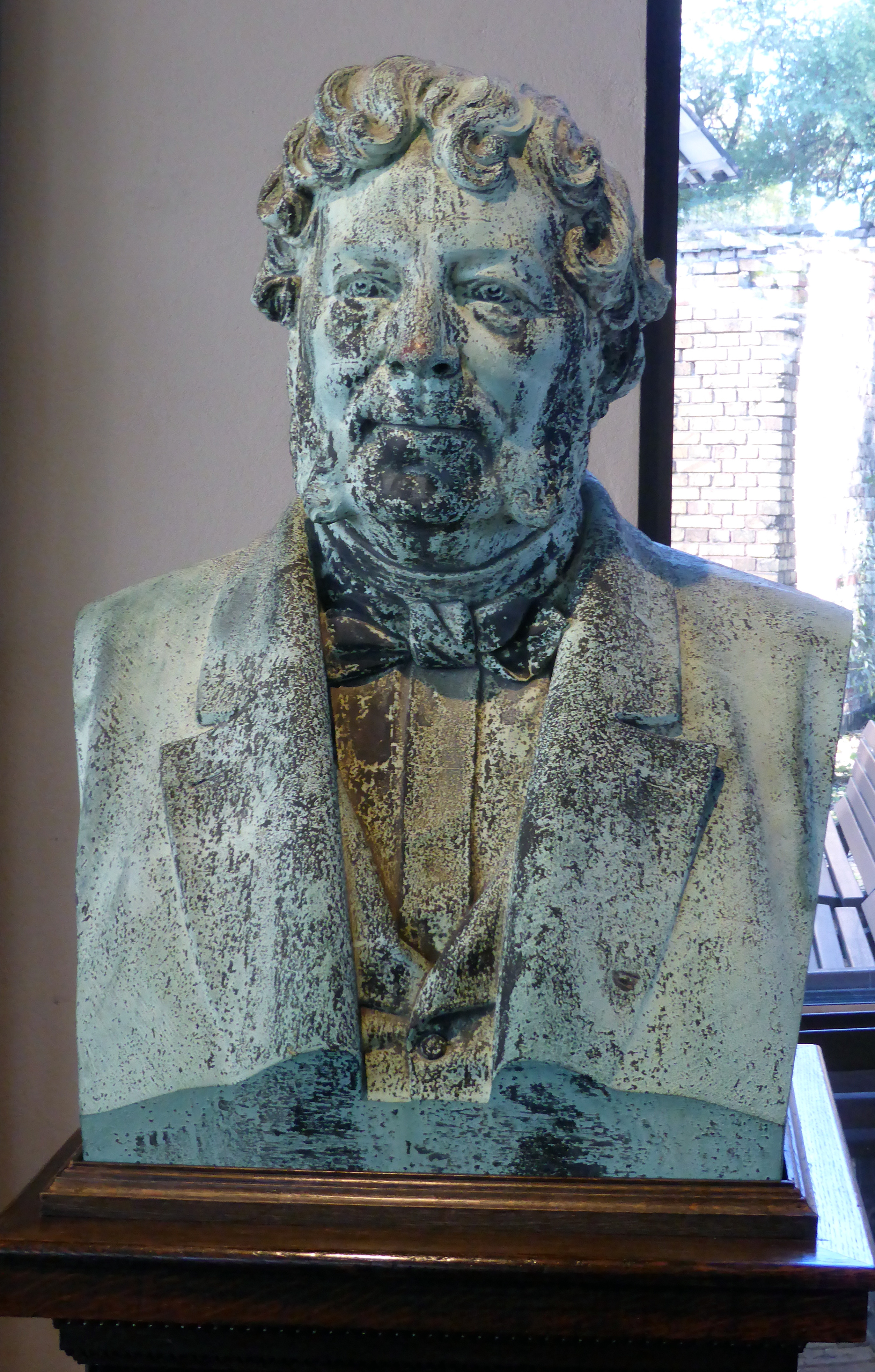 Bronzebüste Friedrich Neuhaus vom Bildhauer Karl Keil von 1883 stand bis 1987 vor dem Hamburger Bahnhof (Berlin). Heute ausgestellt im Deutschen Technikmuseum in Berlin. Inventarnummer: VBM E-B-5000. Wikipedianische KulTour am 10. Oktober 2015 in der Ausstellung des Museums.